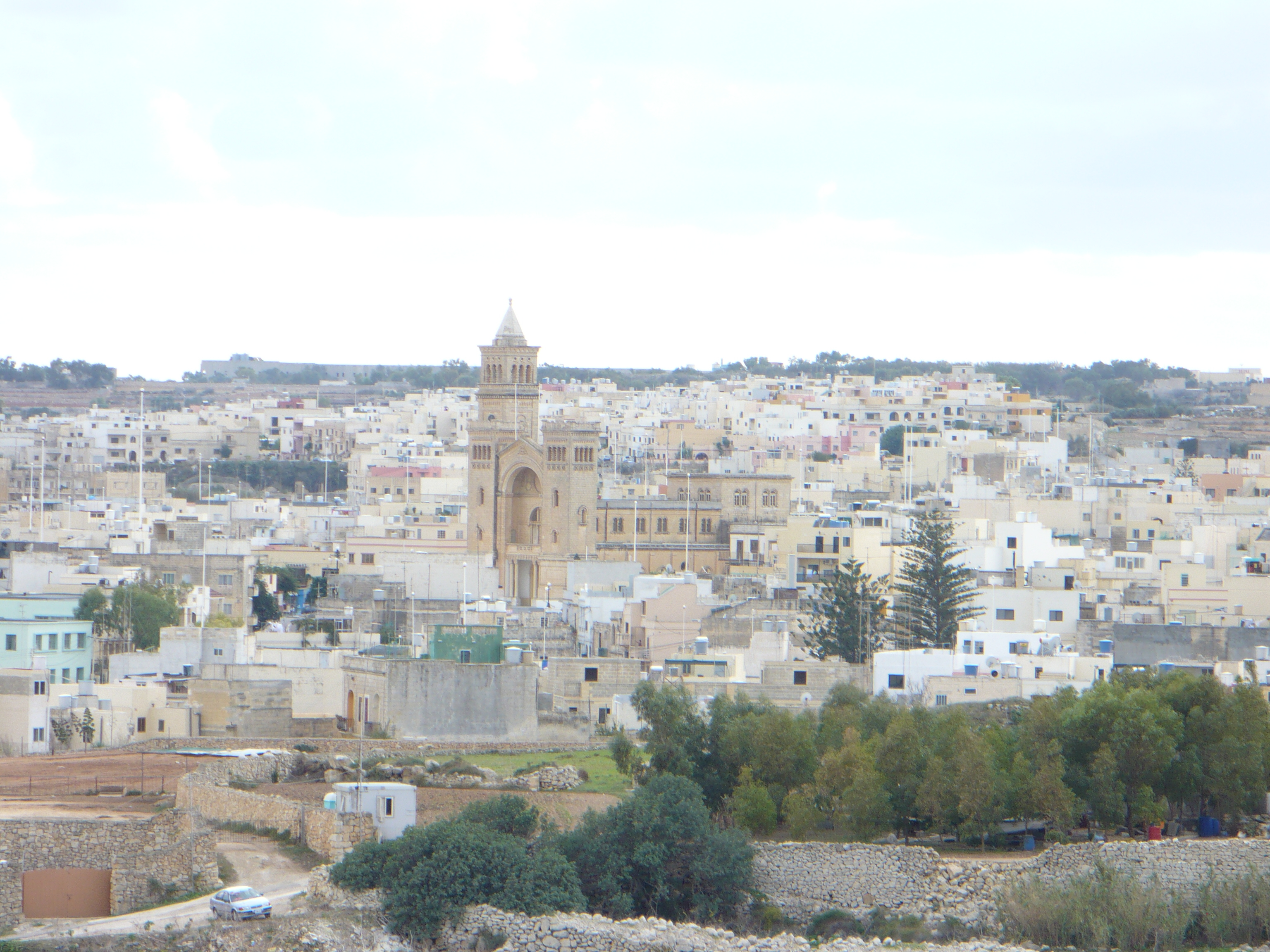 Malta